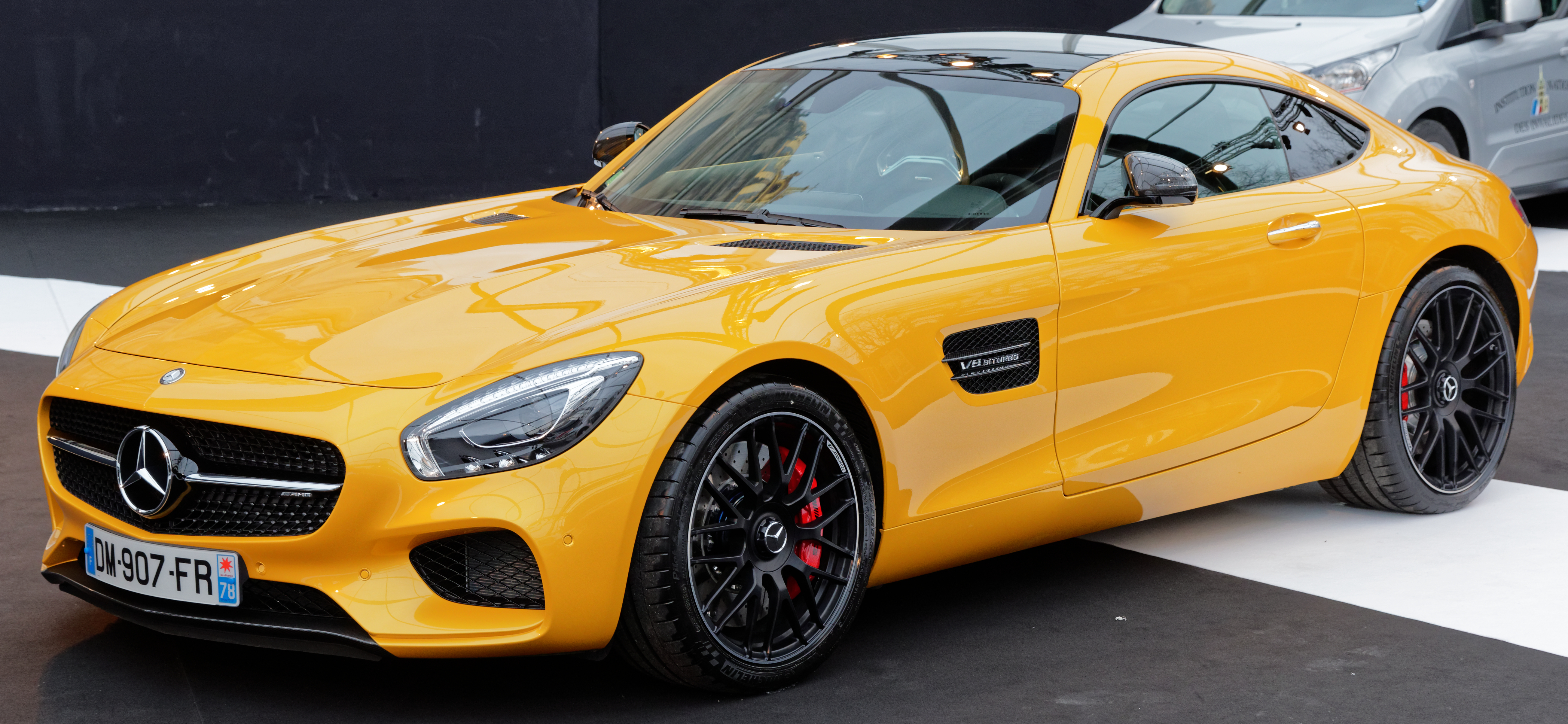 La Mercedes AMG GT exposée lors du festival automobile international 2015.